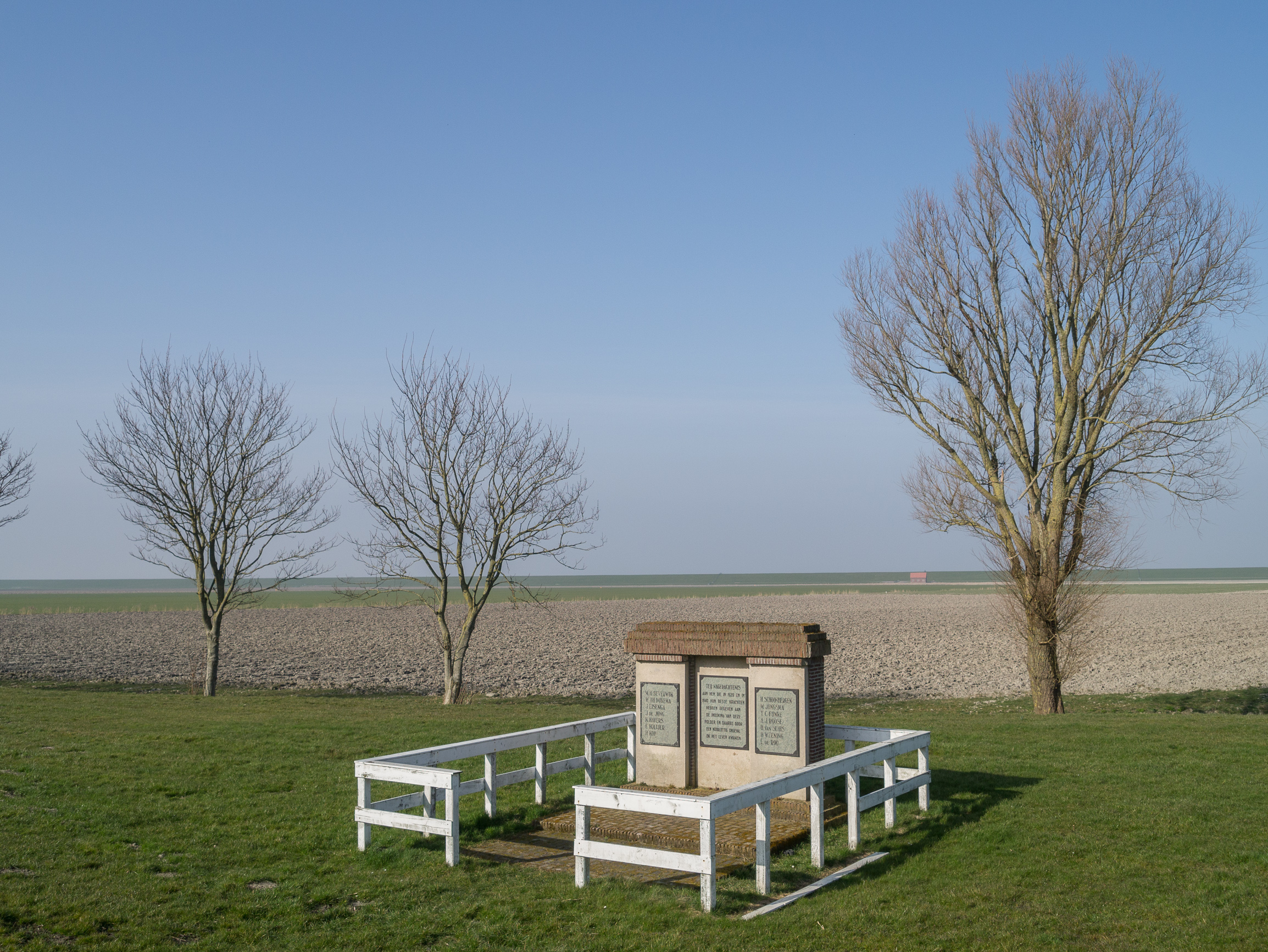 Monument slachtoffers aanleg Linthorst Homanpolder